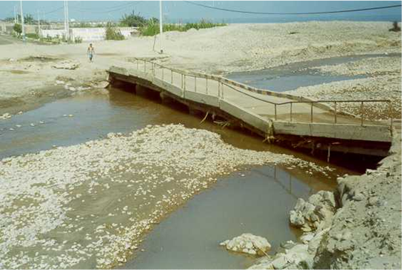 Puente en la costa peruana, dañado por las crecidas ocasionadas por el Fenómeno El Niño. Autor: Alfredo Bianco. Perú, 1998